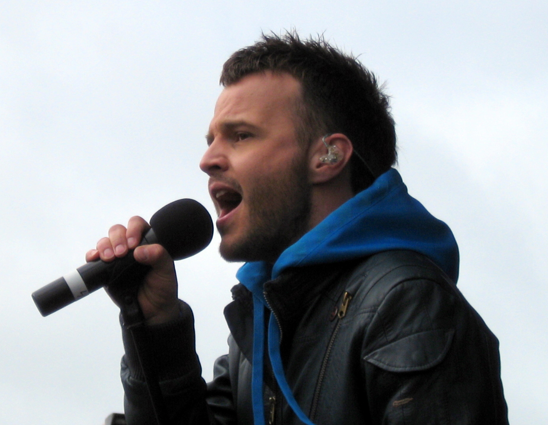 Bryan Rice @ Skovmand & Bues Fødselsdag i Hirtshals